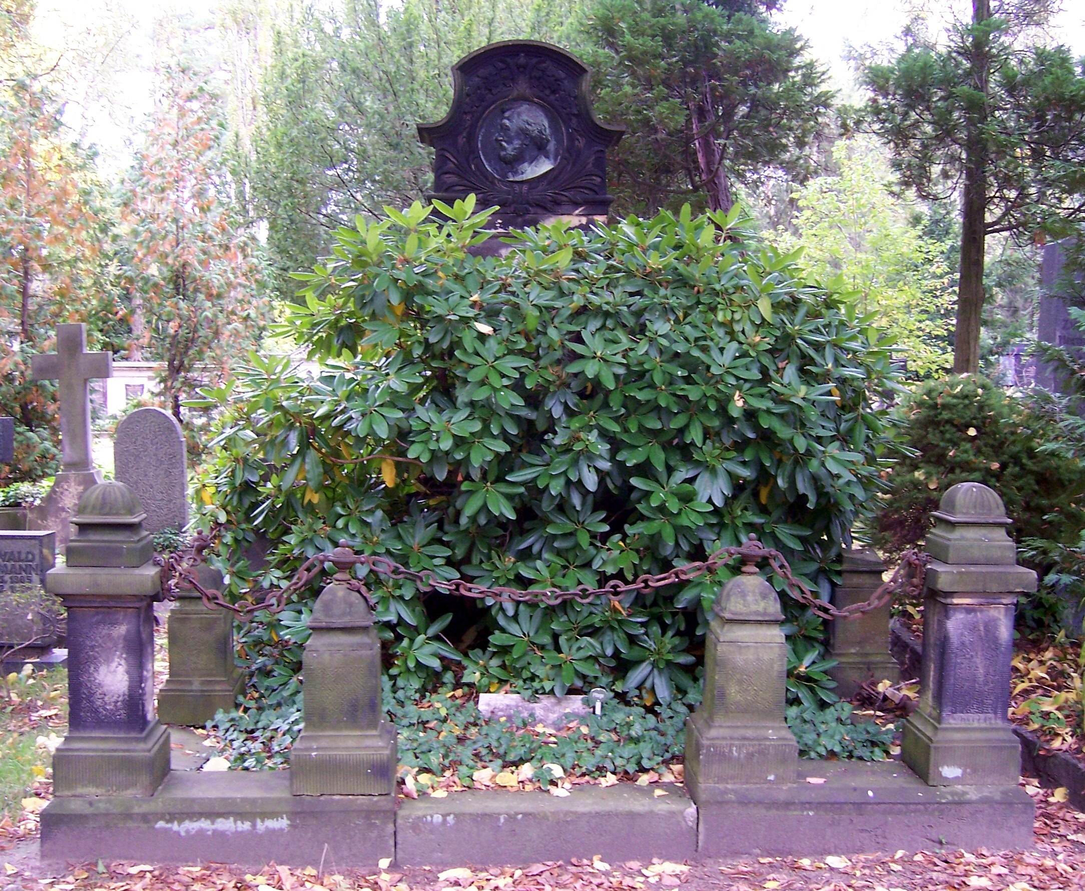 Grab des deutschen Architekten Georg Rudolf Schilling auf dem Johannisfriedhof in Dresden.